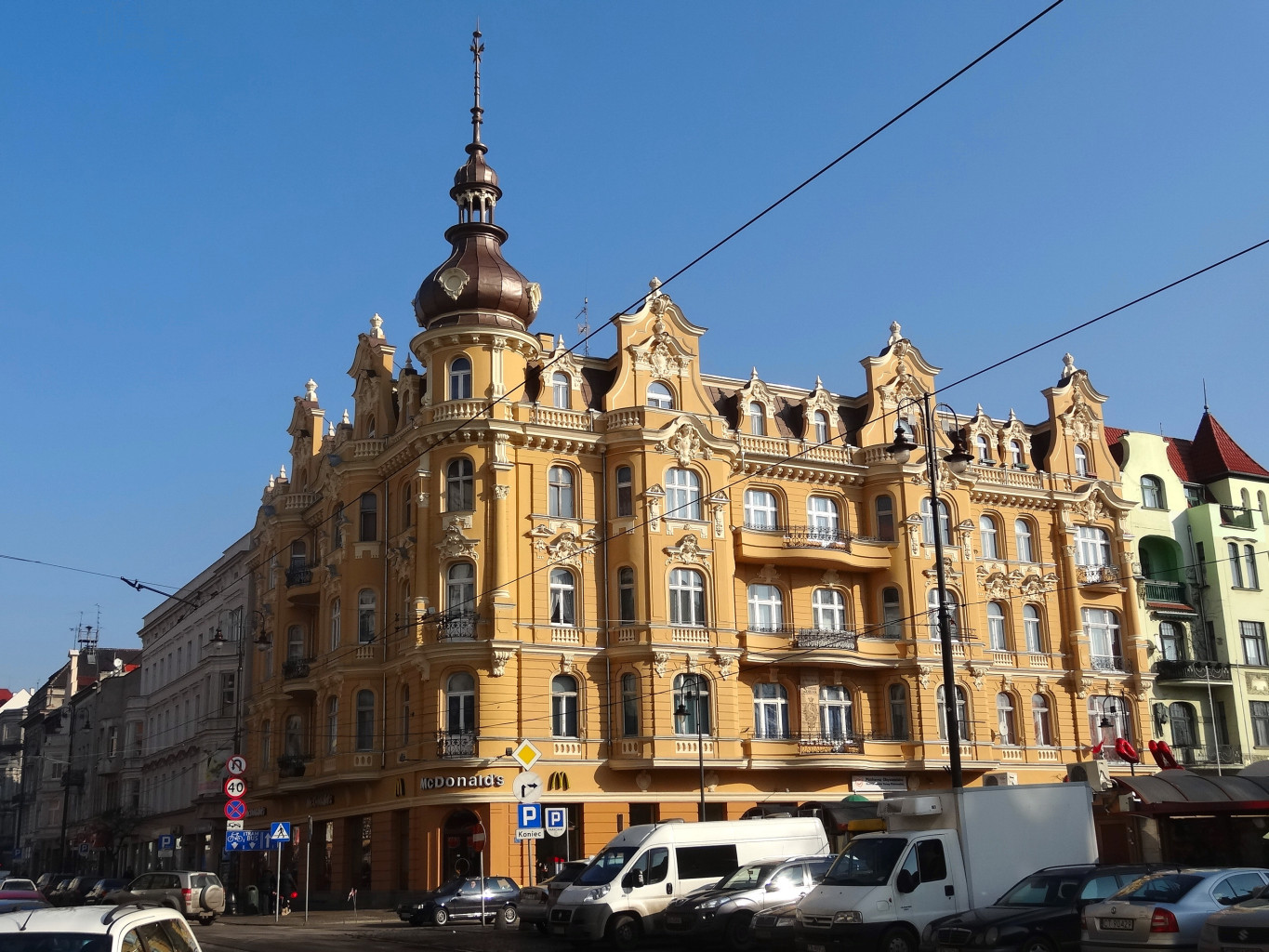 Kamienica Plac Wolności 1 w Bydgoszczy, róg ul. Gdańskiej (1898, Józef Święcicki)